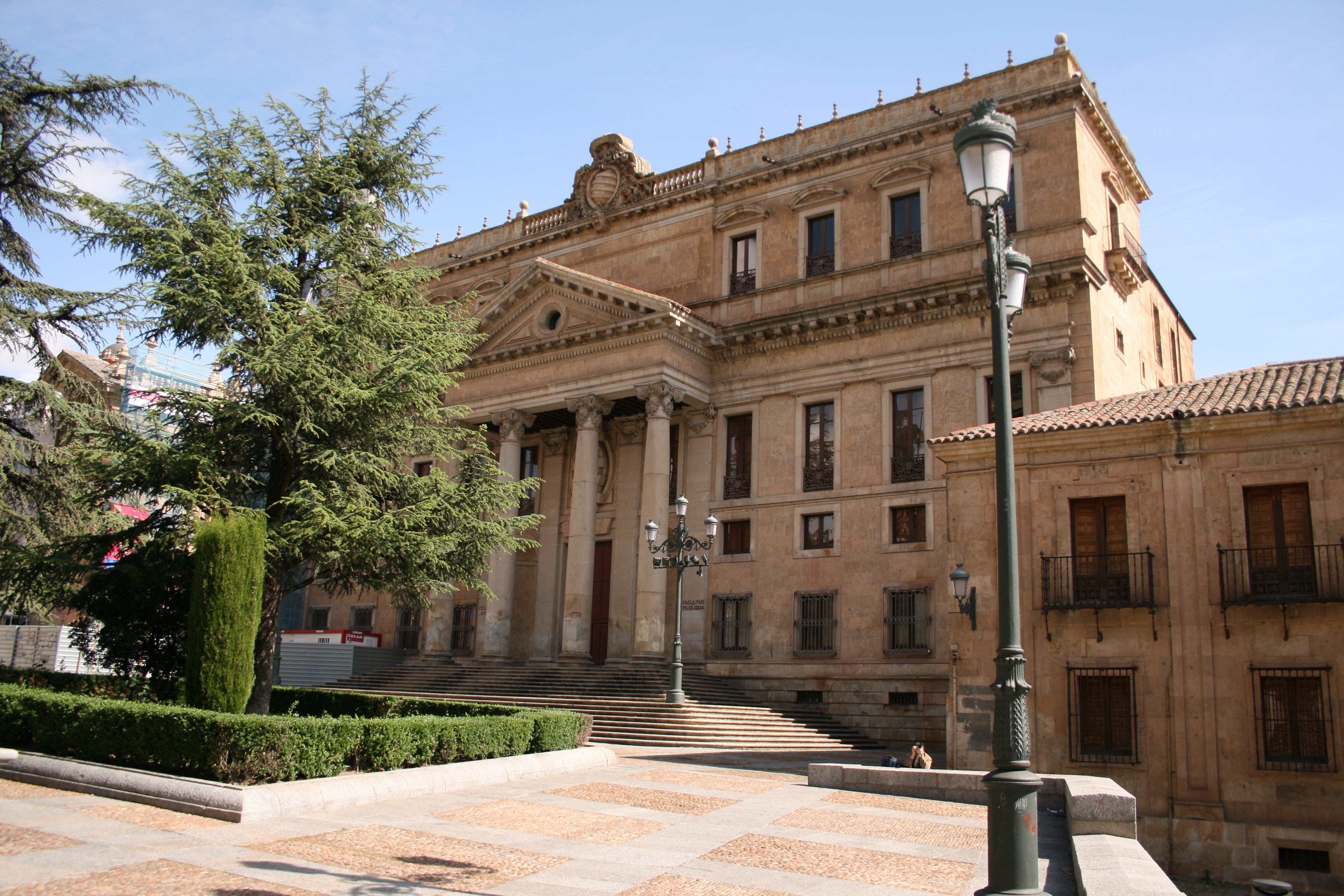 Palacio Anaya (Salamanca)